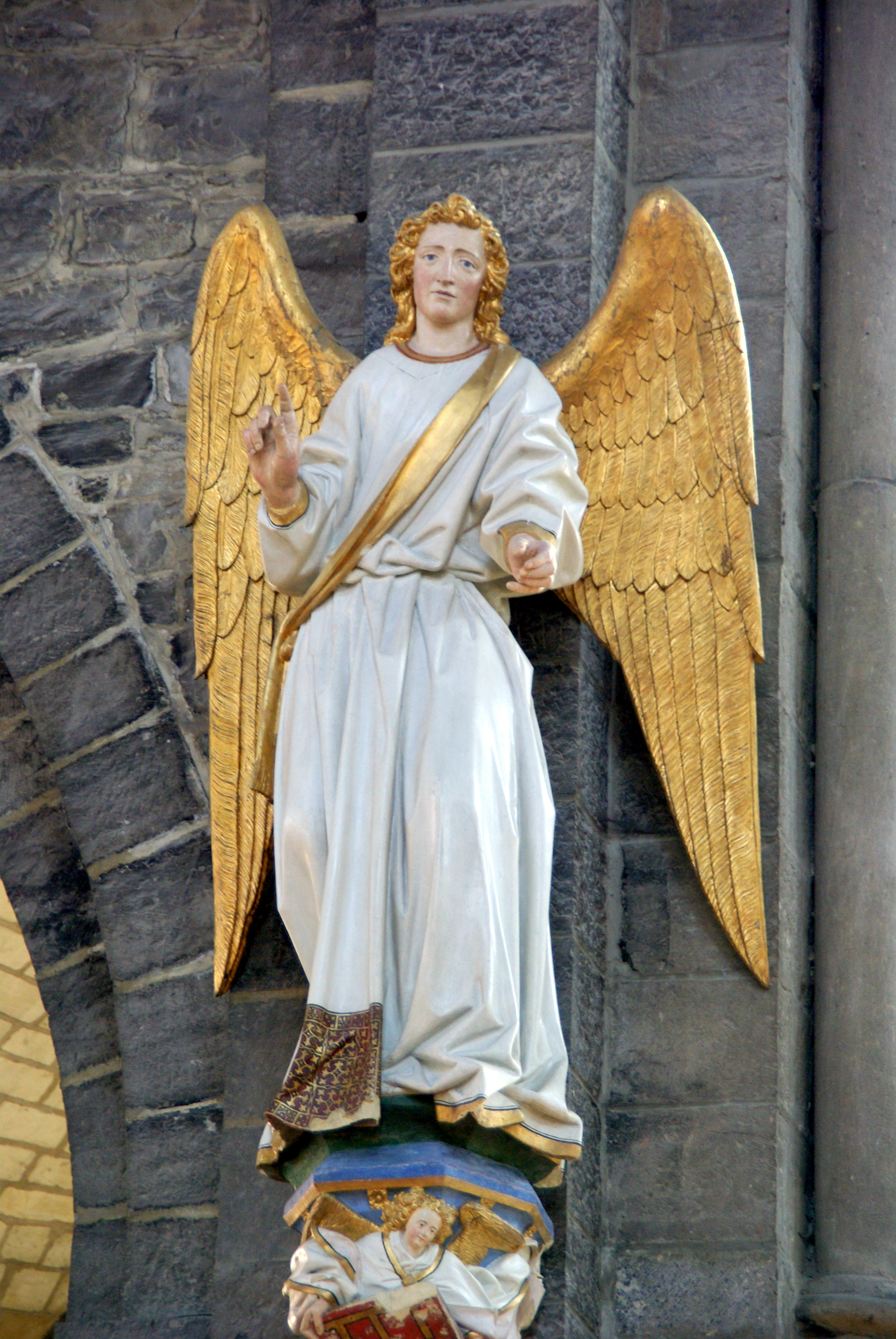 cette statue constitue la groupe dit de l'Annonciation, église Saint-Quentin de Tournai